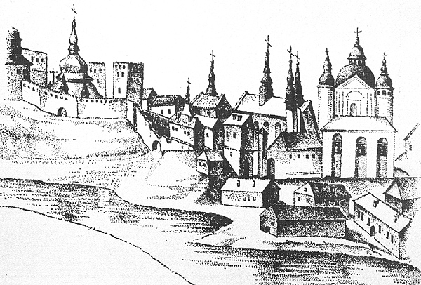 Ікона святого Ігнатія, фрагмент